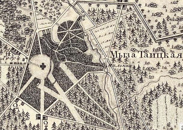 Мыза Таицкая на карте 1817 года.